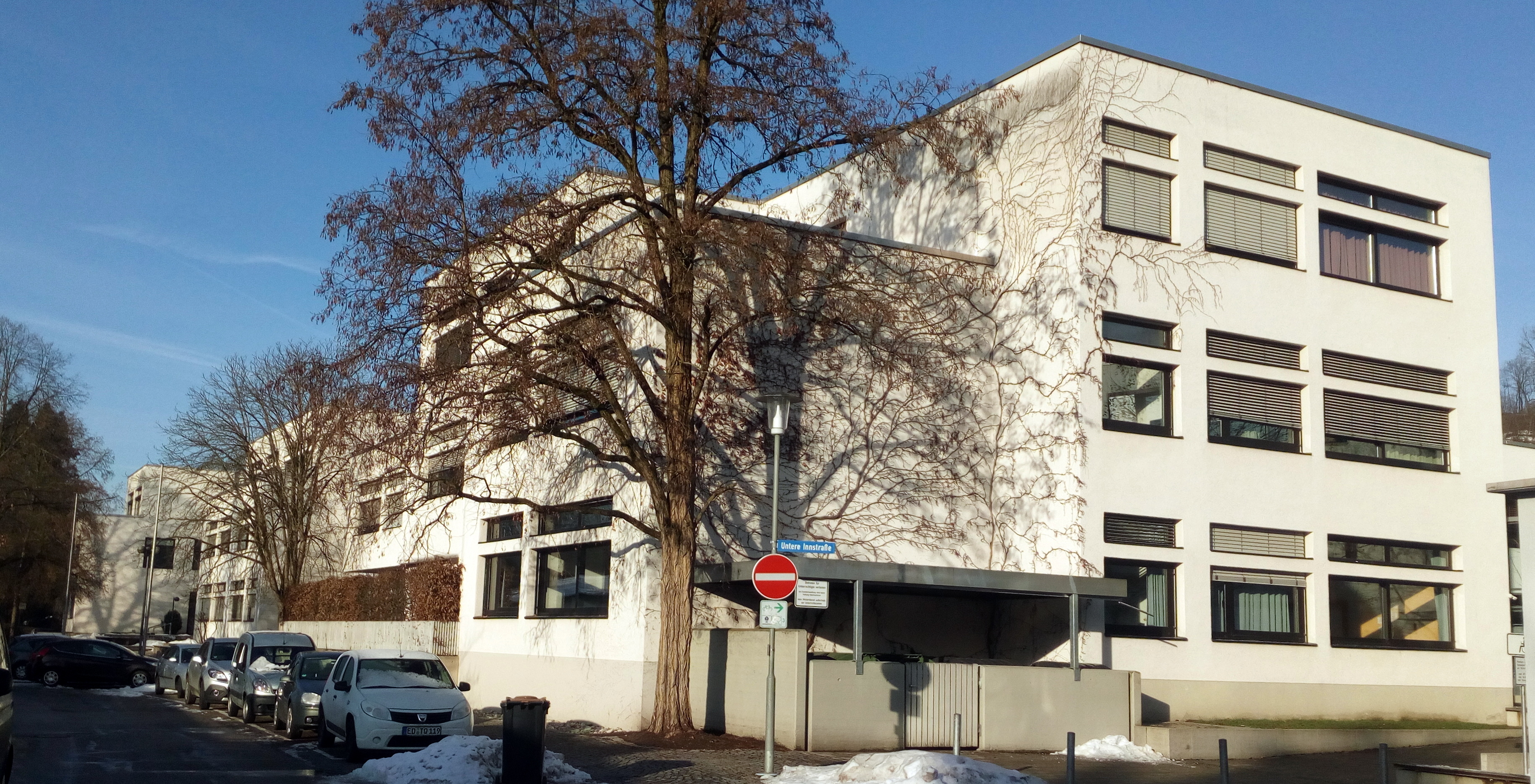 Anton-Heilingbrunner-Schule in Wasserburg